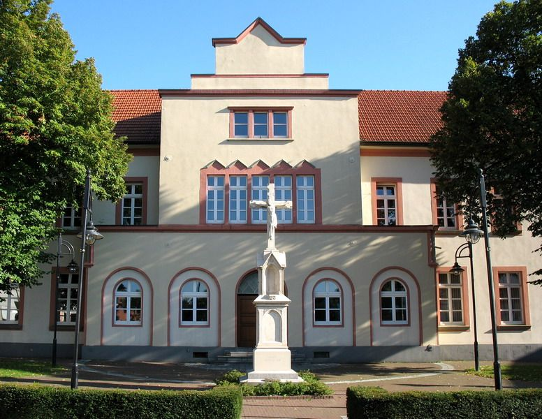 Front des 'Alten' Ratheimer Rathauses